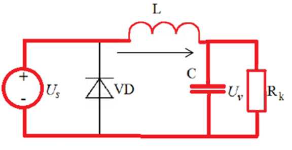 Voolu liikumine, kui lüliti on suletud